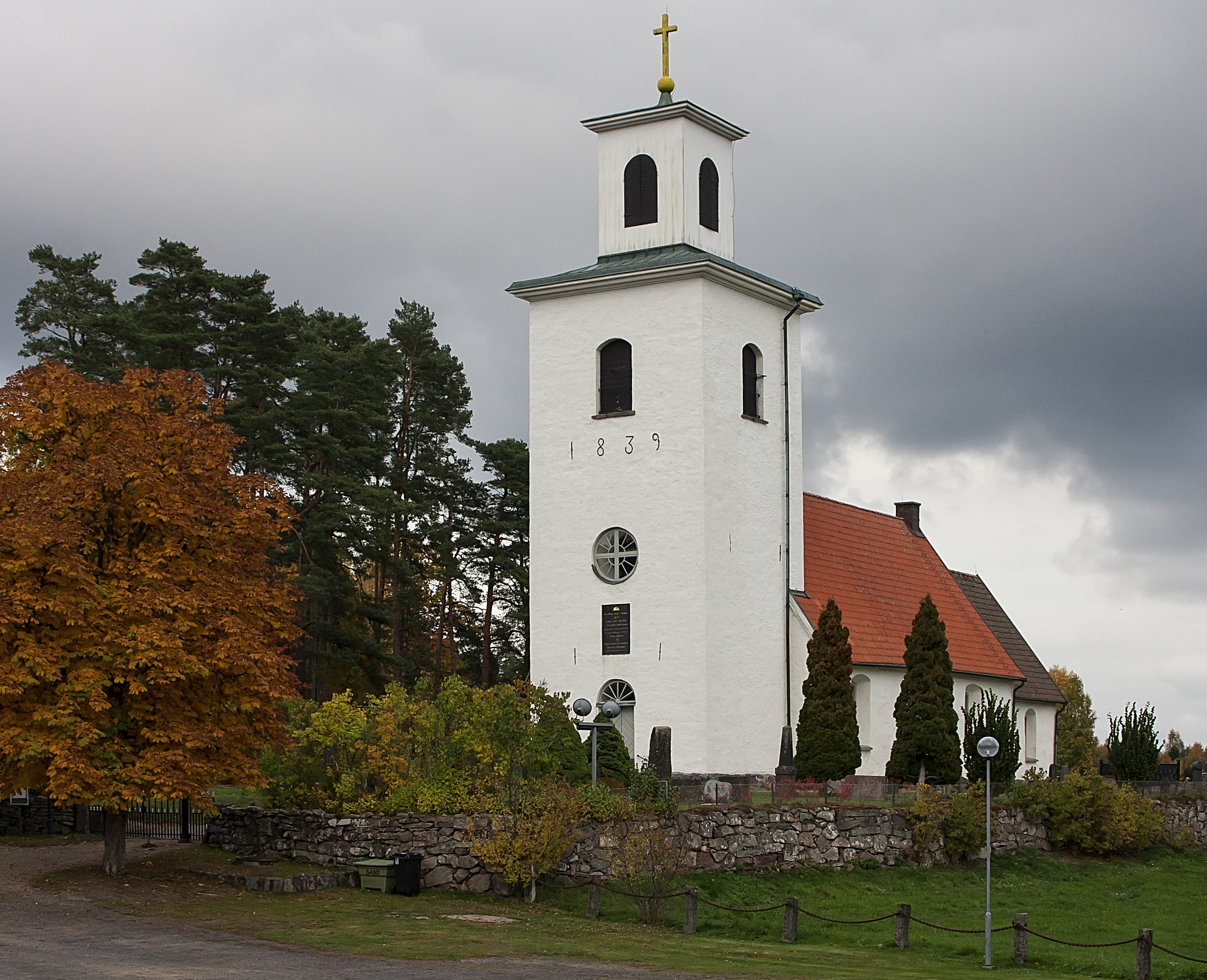 Visseltofta kyrka.